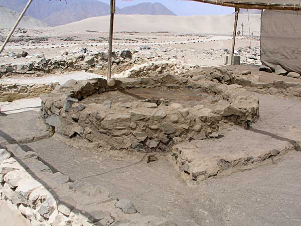 El Altar del Fuego Sagrado, Caral. Foto: Se.Xauxa 2004 Categoría:Perú (imagen) Categoría:Imágenes GFDL